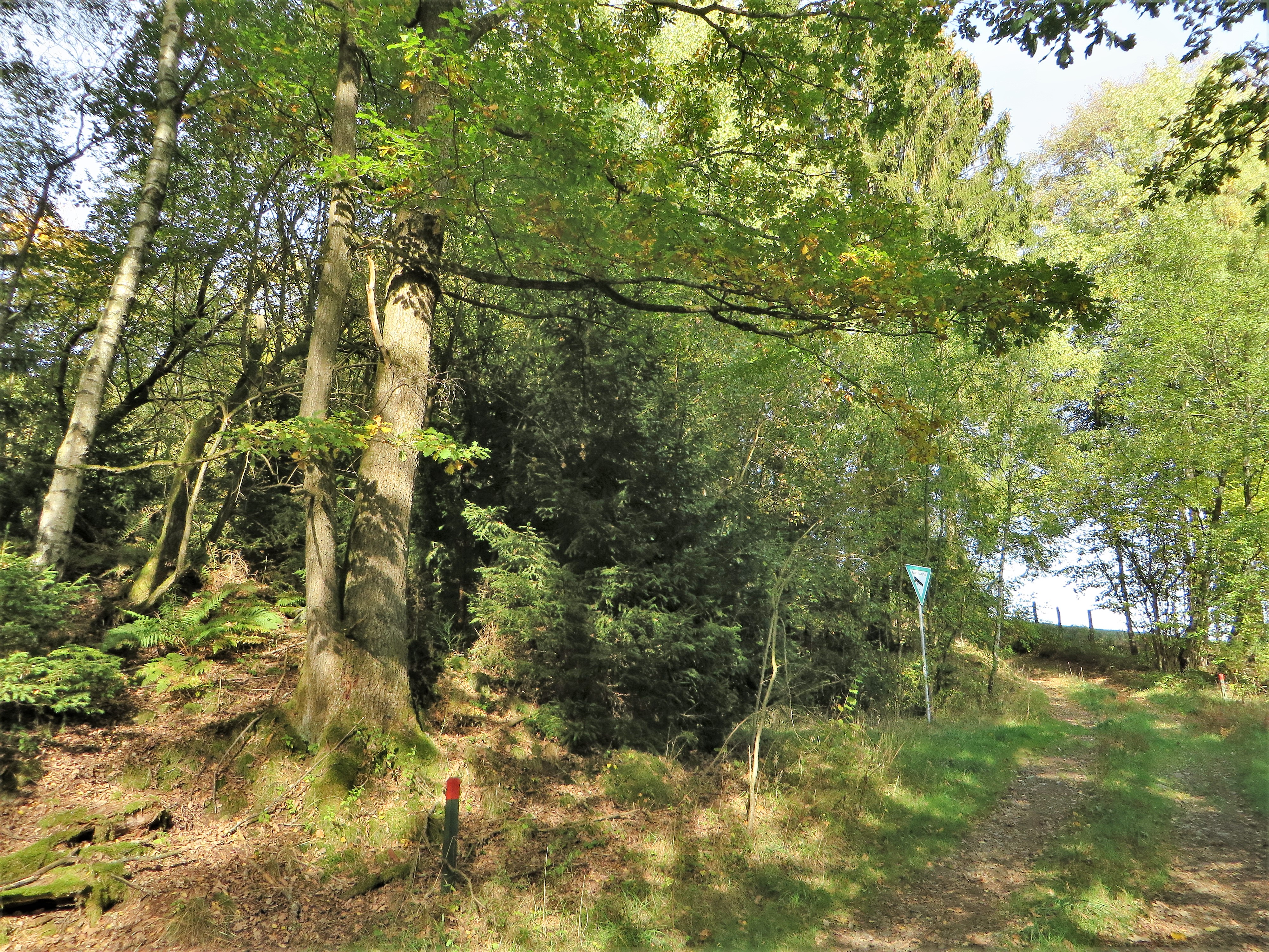 Naturschutzgebiet (OE-056) „Steinbruch Eichen“ in Attendorn-Eichen. Blick auf den Wanderweg der am Schutzgebiet vorbeiführt. Der Steinbruch selbst ist weiträumig umzäunt, Betreten verboten.